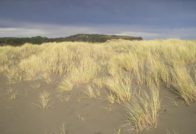 Plantas de Ammophila arenaria en las dunas de Deñal, costa occidental de la Isla Grande de Chiloé